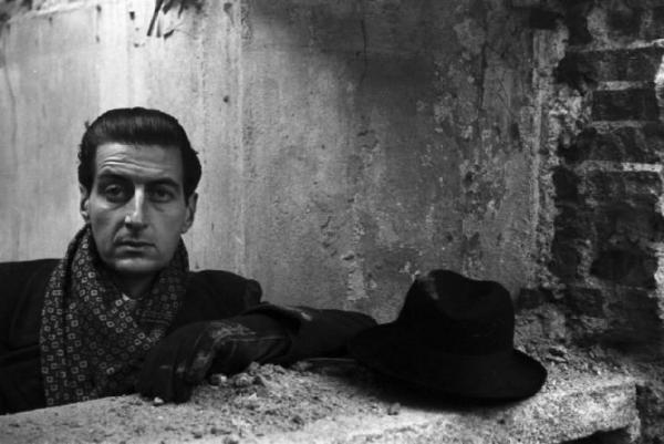 pittore e scenografo italiano